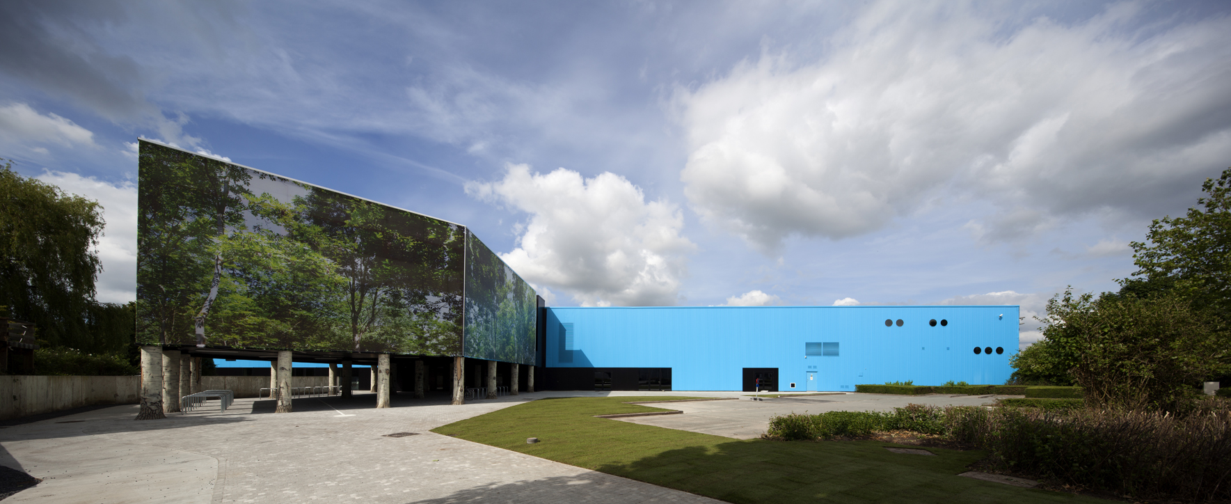 Oostcampus